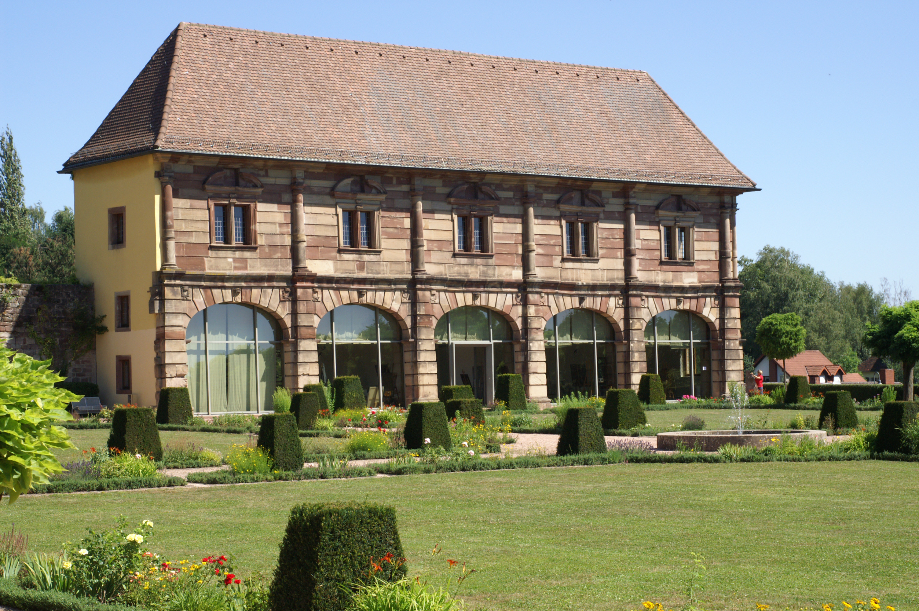 Die Orangerie in Blieskastel (Deutschland, Saarland), Rest der ehemaligen Schlossanlage, 21. Juli 2006